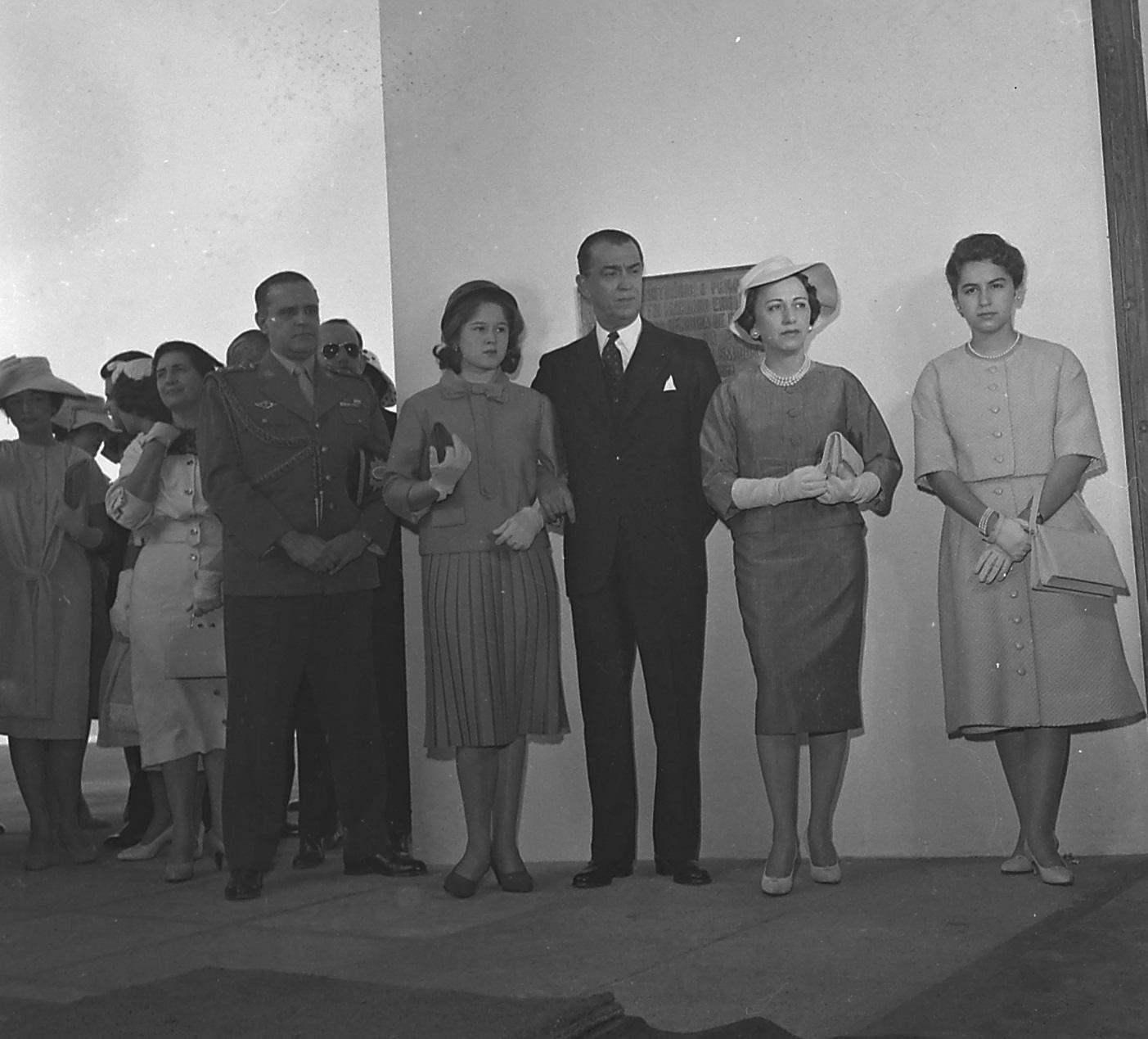 Imagem do Fundo Agência Nacional, do Arquivo Nacional